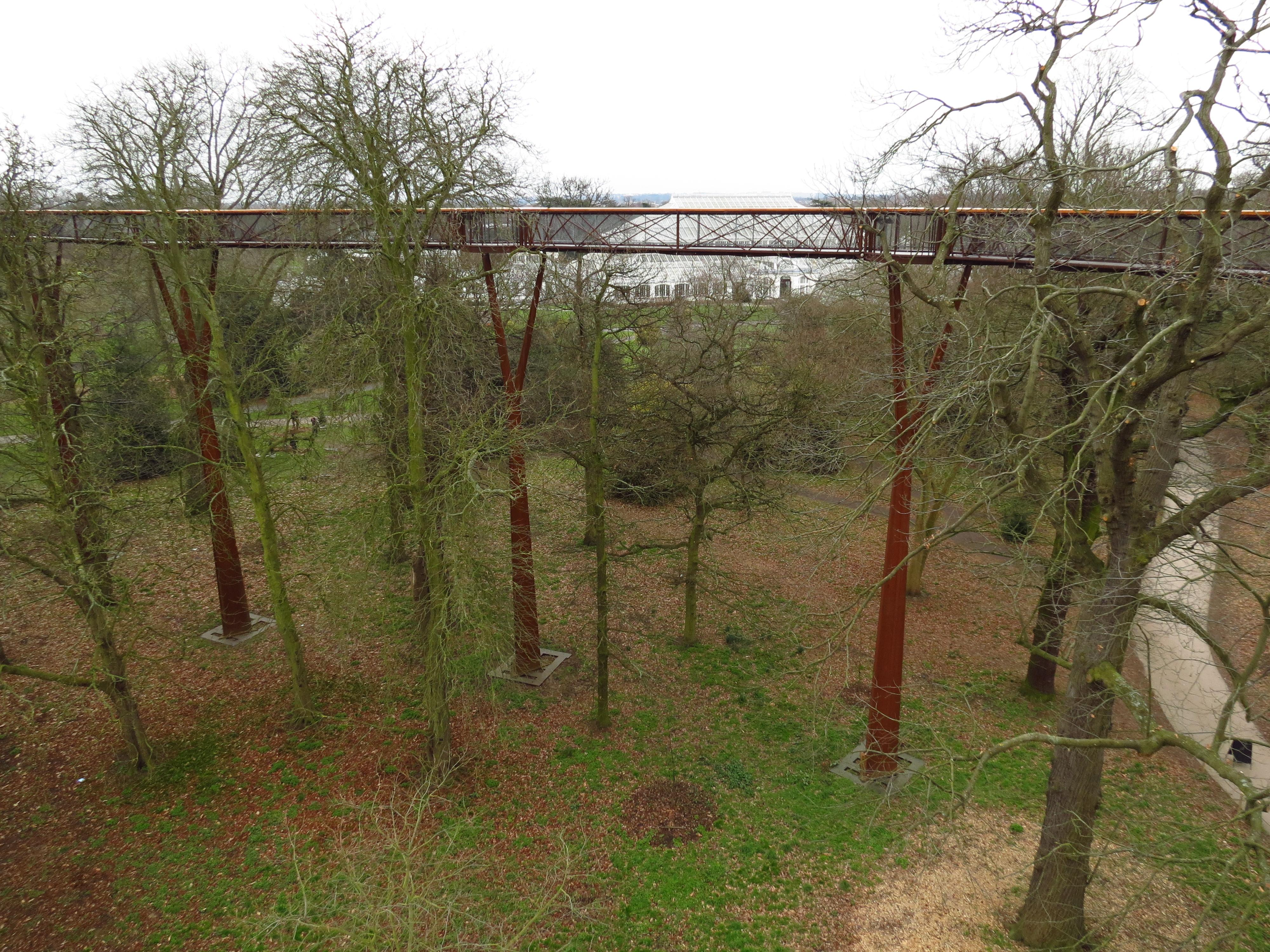 Baumkronenpfad in Kew Gardens (London, England).